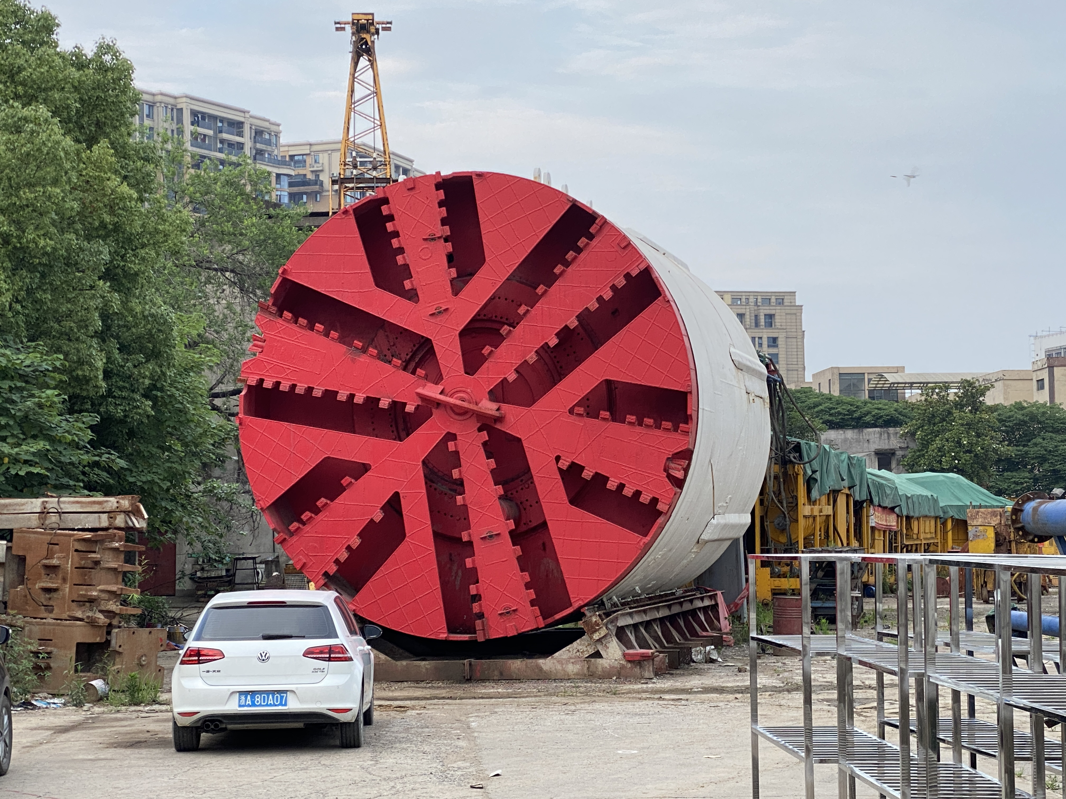 杭州地铁用盾构机